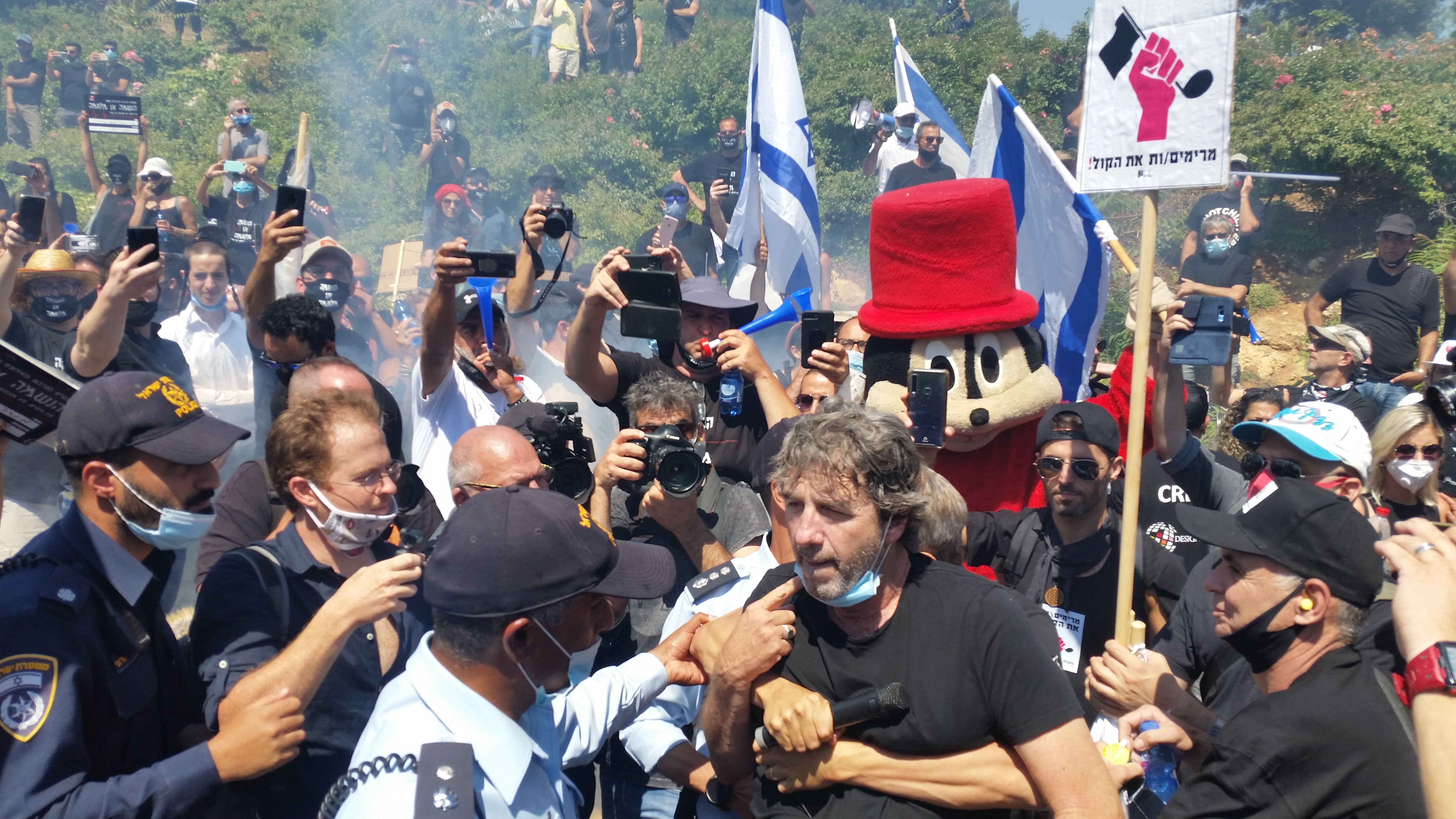 הפגנת תעשיית התרבות בירושלים